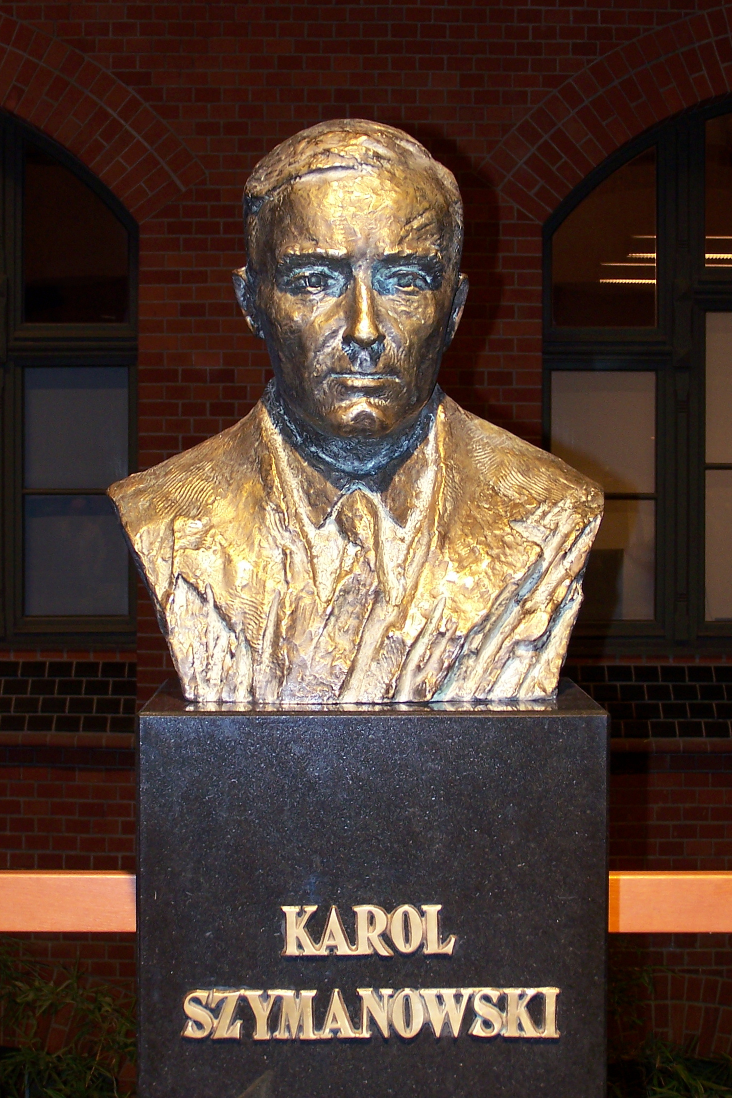 Popiersie Karola Szymanowskiego w Akademii Muzycznej w Katowiach.